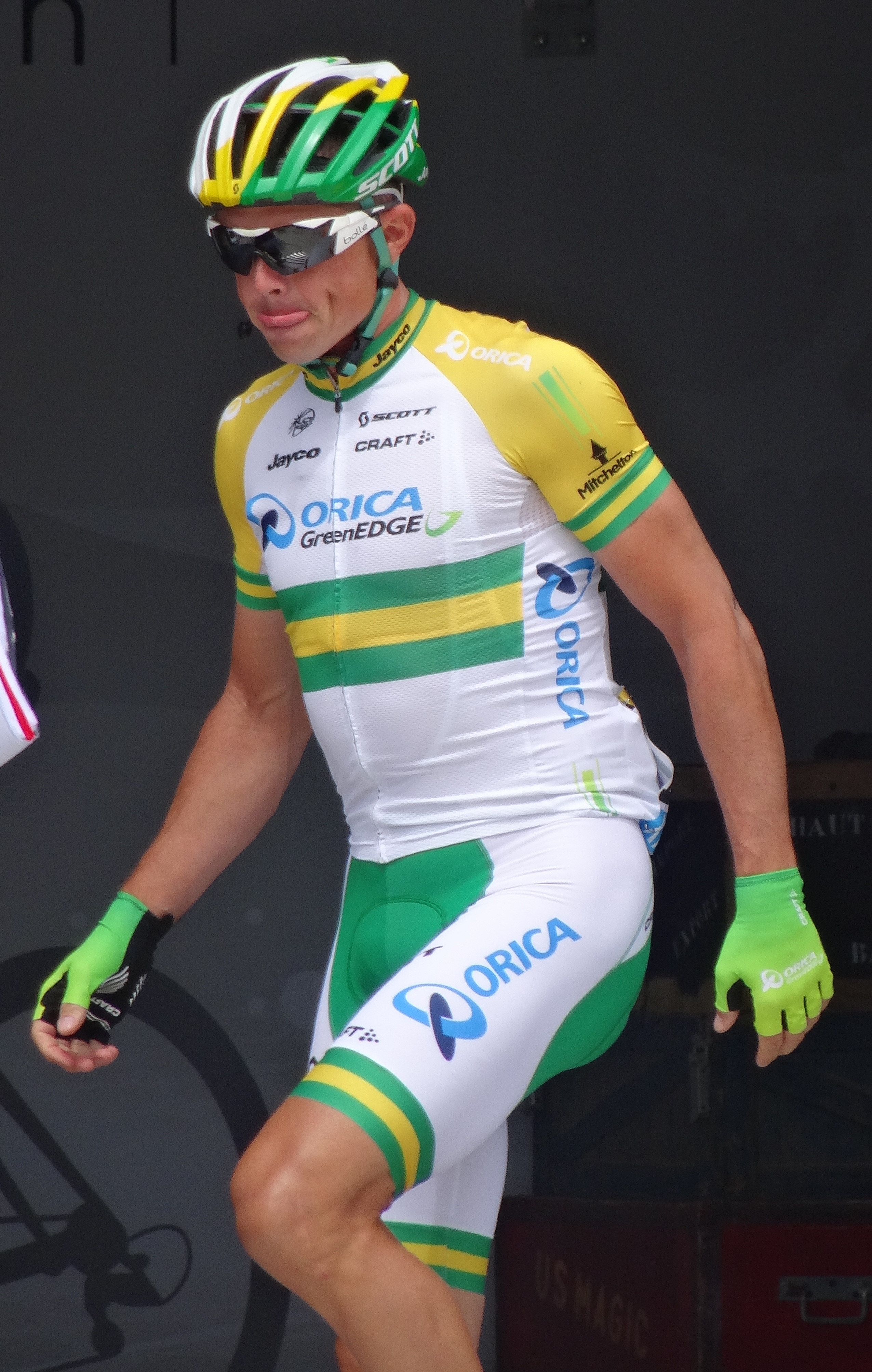 Reportage photographique réalisé le mardi 8 juillet à l'occasion du départ de la quatrième étape du Tour de France 2014 au Touquet-Paris-Plage, Nord-Pas-de-Calais, France.